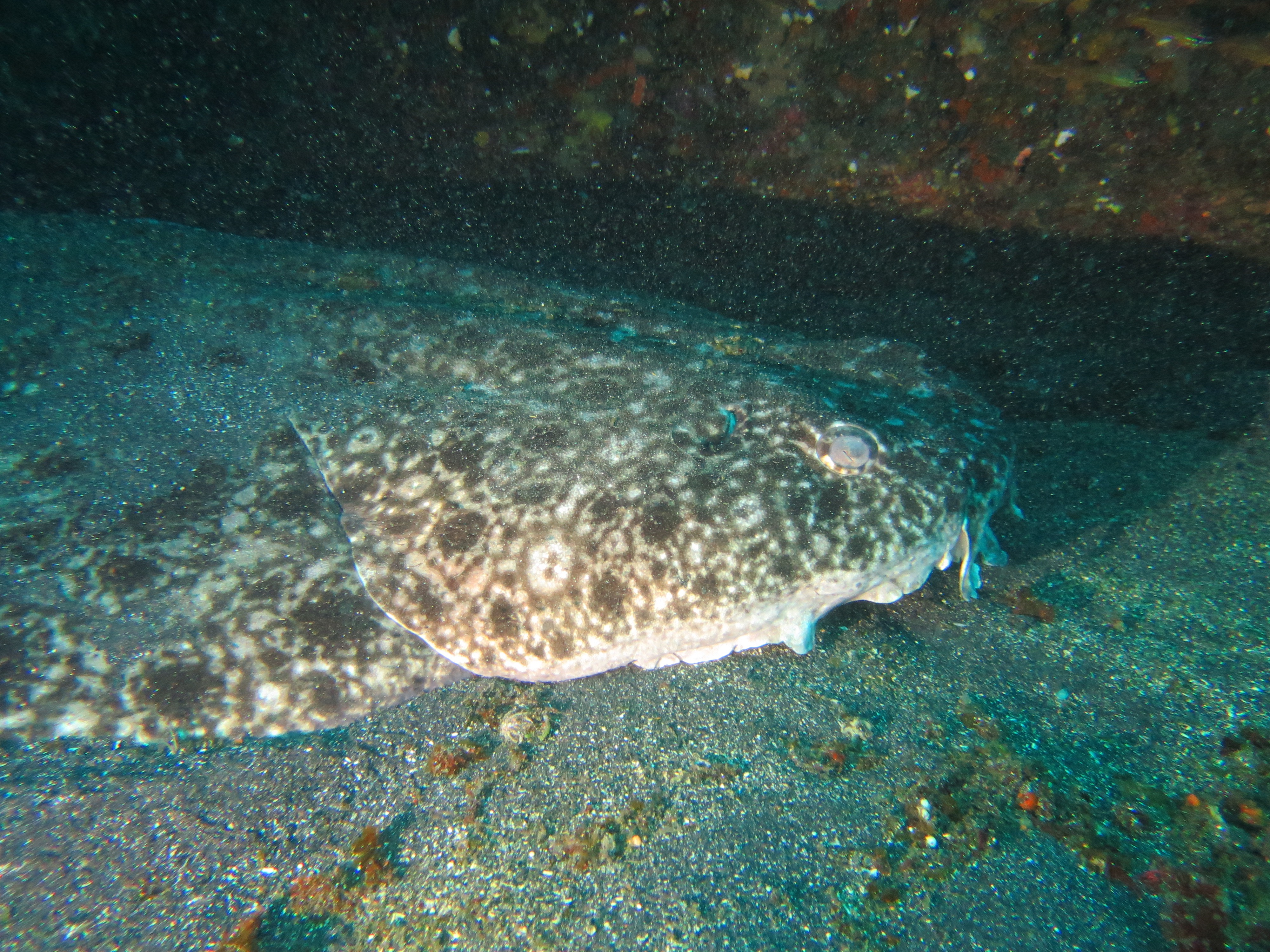 ２０１５年５月に三宅島で撮影したコロザメです。